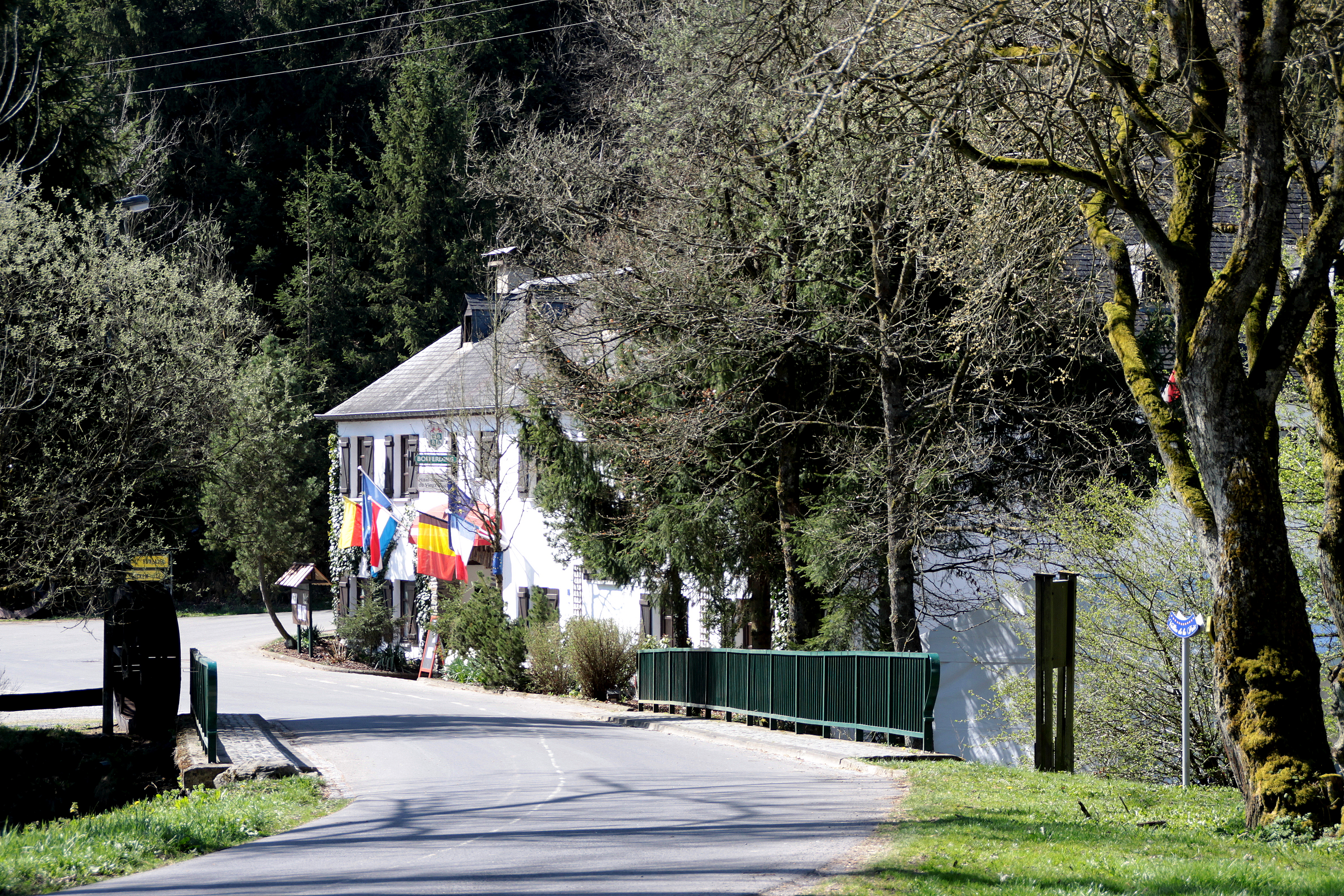 D'Mille vun der Bréck aus gesinn